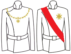 Modo di indossare le decorazioni dell'Ordine Reale di San Gennaro (Regno delle Due Sicilie)